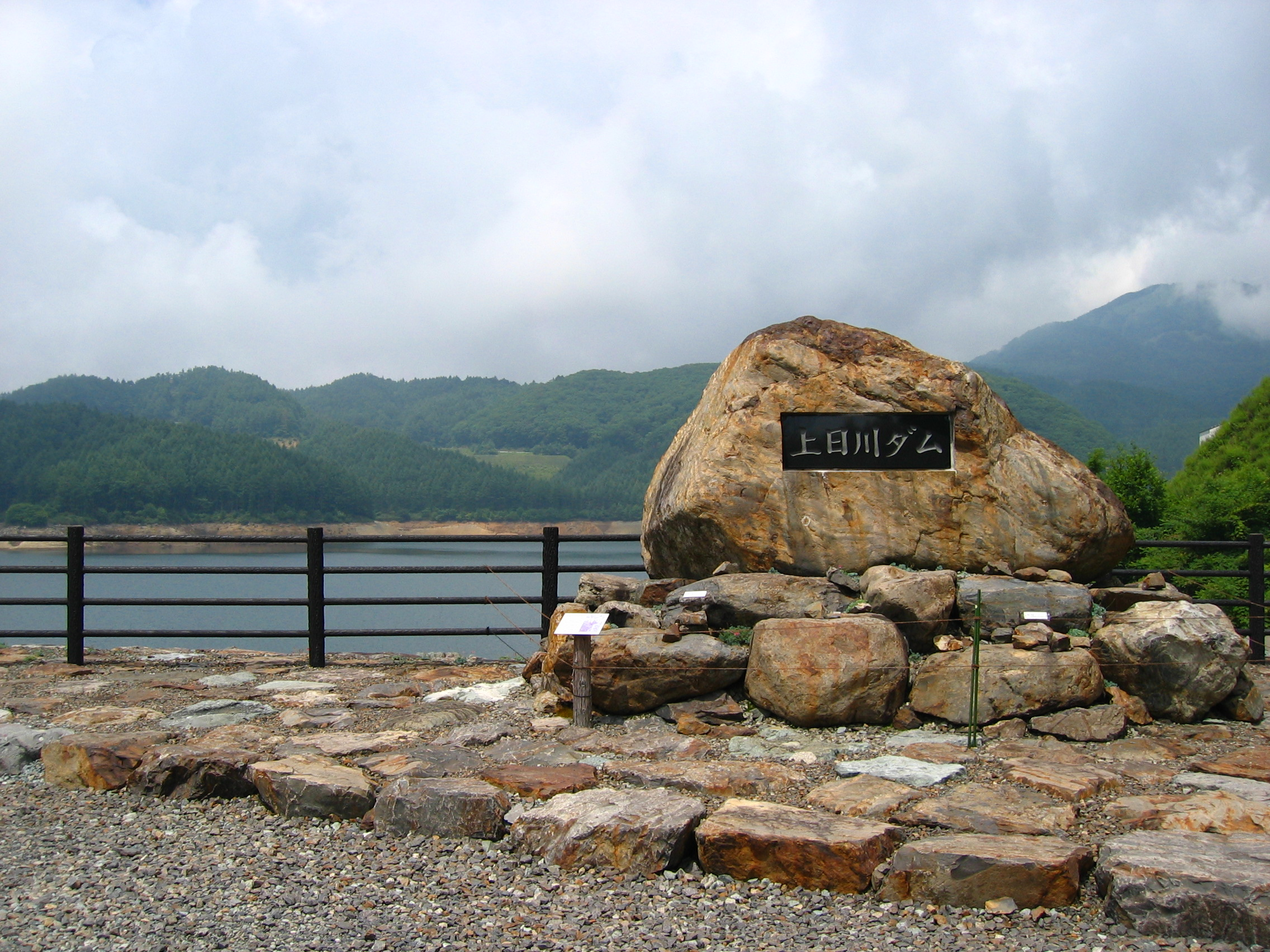 Kamihikawa Dam (上日川ダム) is a dam in Yamanashi, Japan.